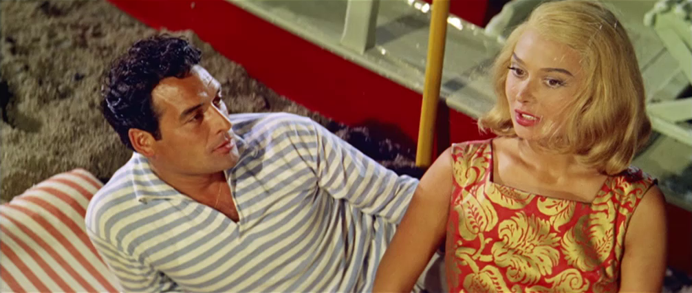 Scena del film Racconti d'estate (1958)